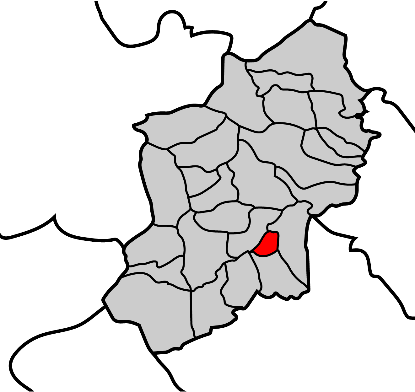 Mapa de la parroquia de Ousón ayuntamiento de Becerreá